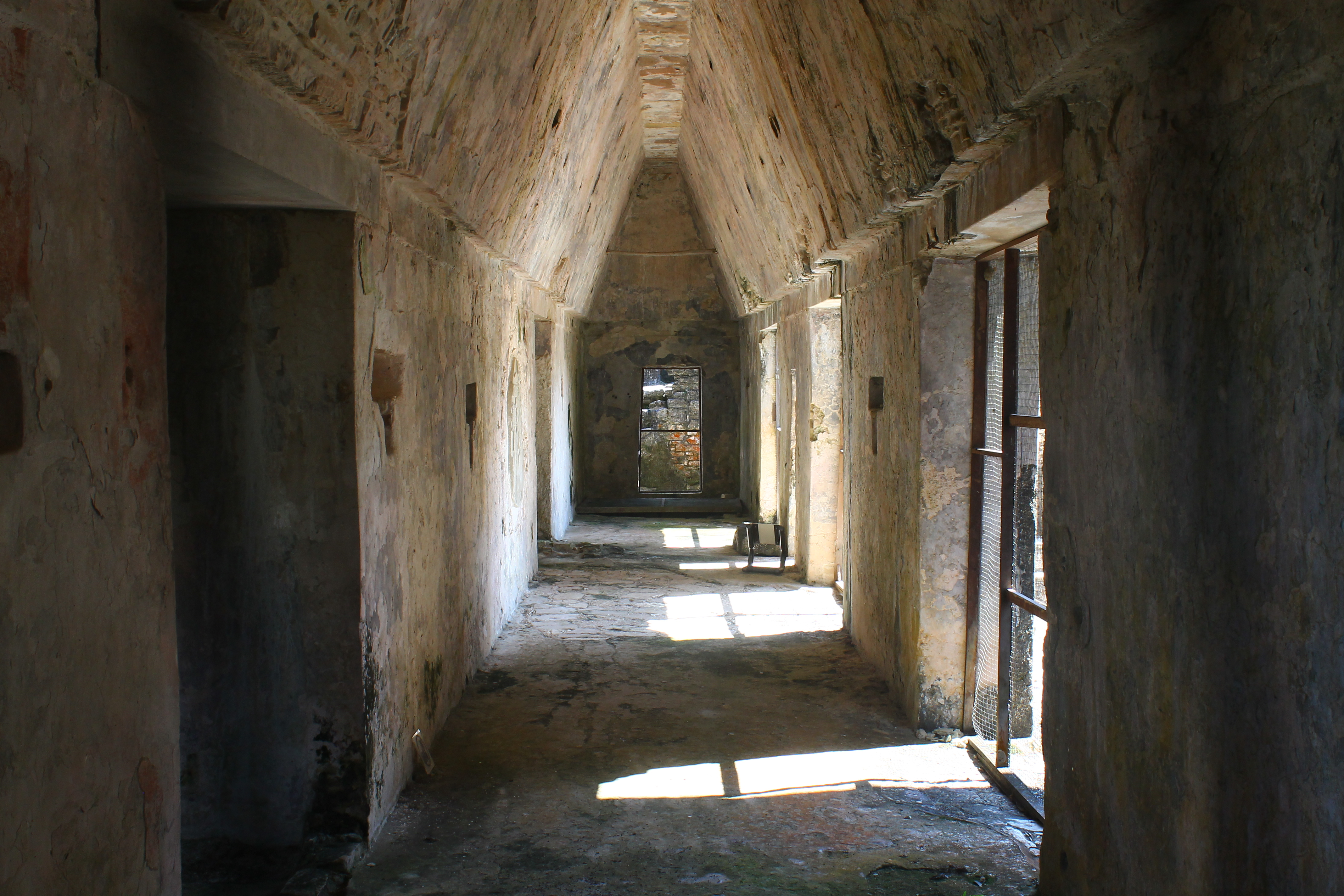 Zona arqueológica de Palenque, Chiapas. Variedad de ángulos, texturas, especies y contrastes.